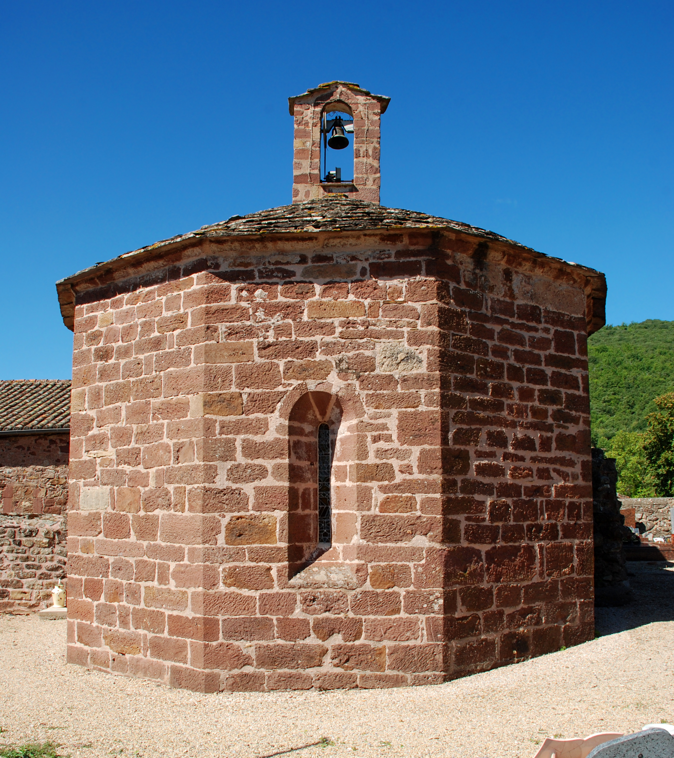 France - Languedoc - Hérault - La Tour-sur-Orb - Église Sainte-Marie de Frangouille